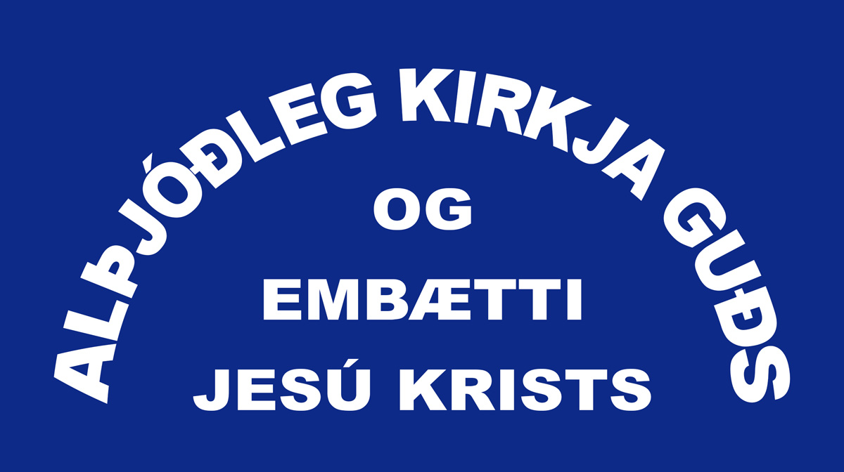 Logo en idioma ISLANDES de la IDMJI Alþjóðleg kirkja Guðs og Embætti Jesú Krists